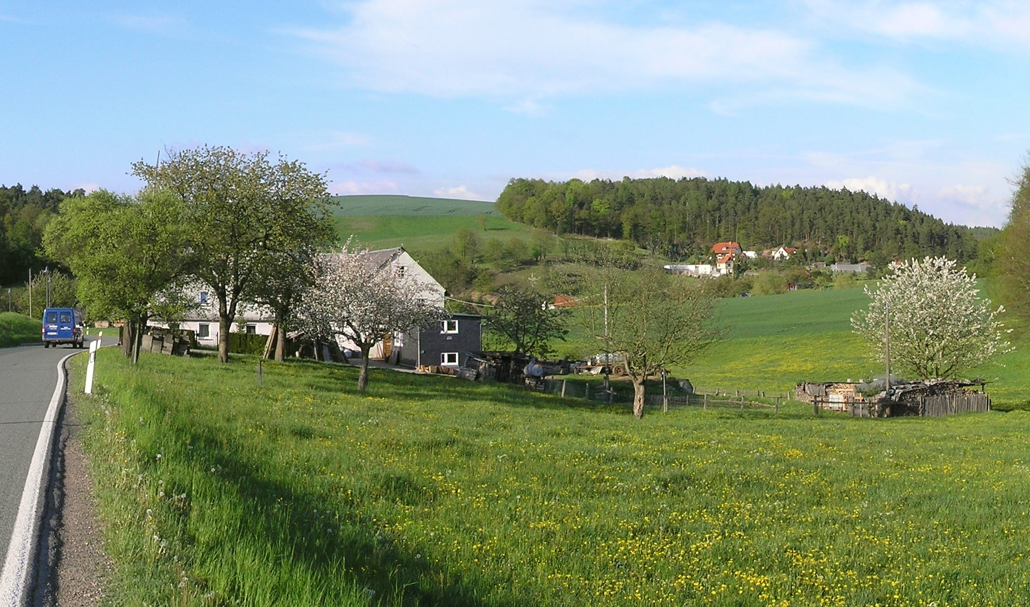 Obergeißendorf (Blick von Süden)